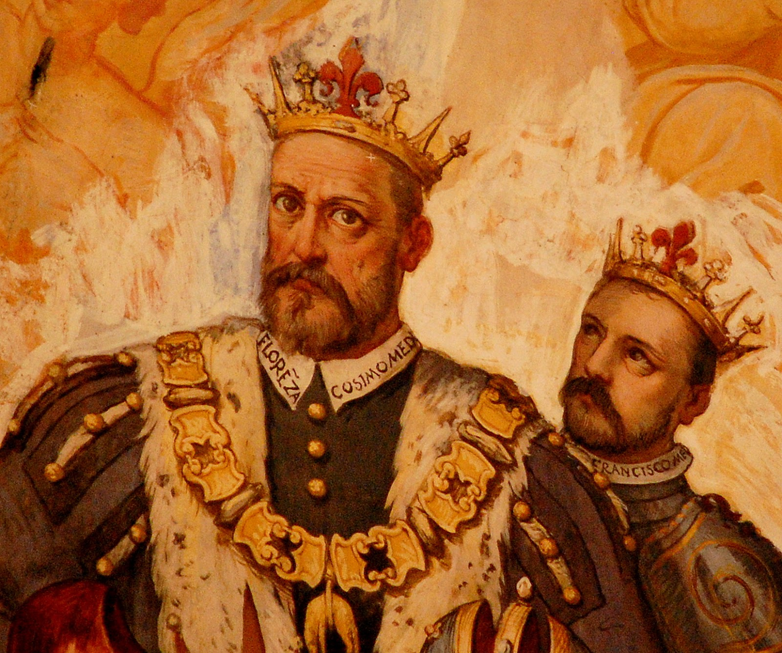 Ritratti di Cosimo I de Medici e il figlio Francesco ritratti da Federico Zuccari nella cupola di Santa Maria del Fiore